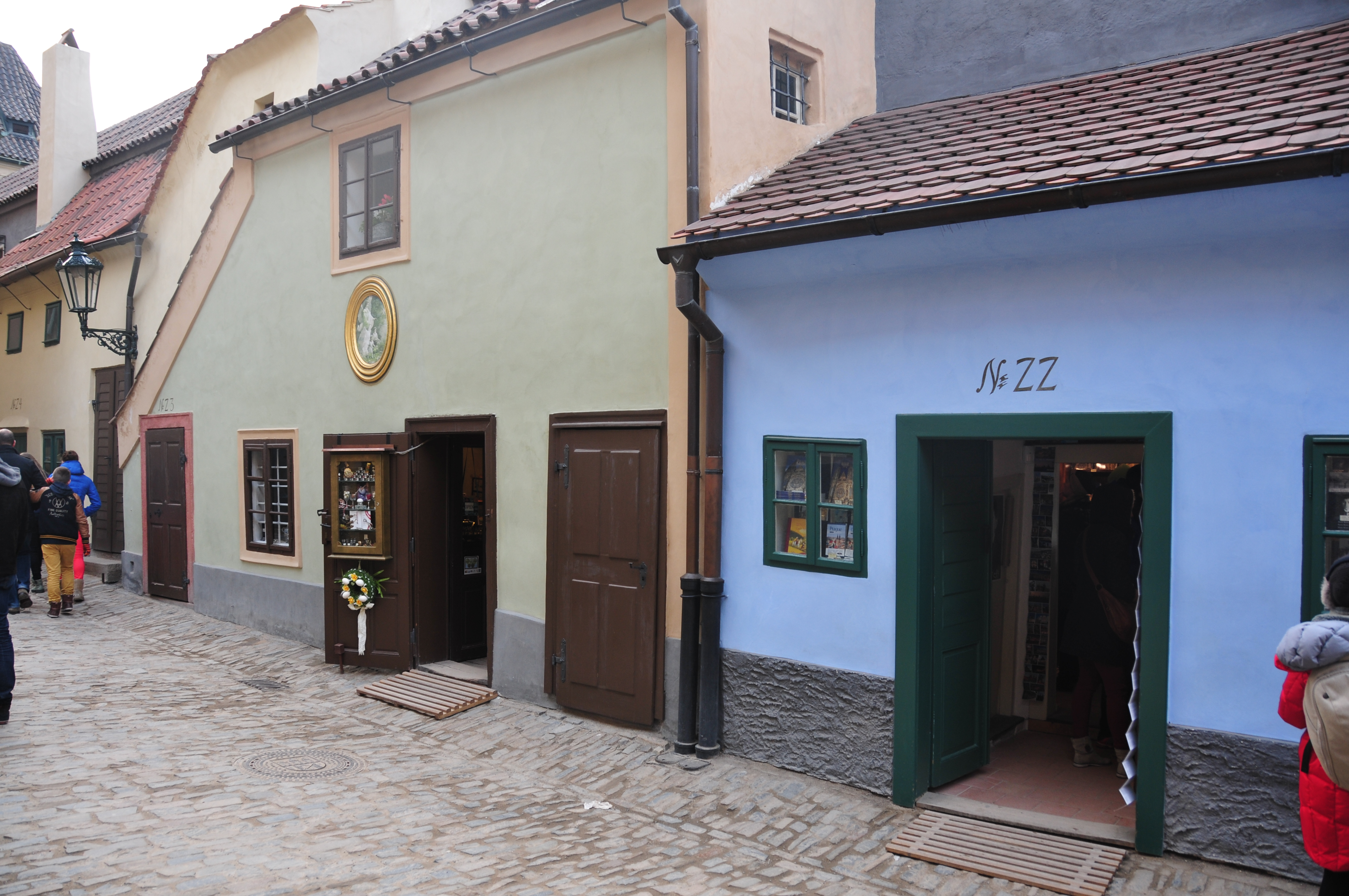 Prag